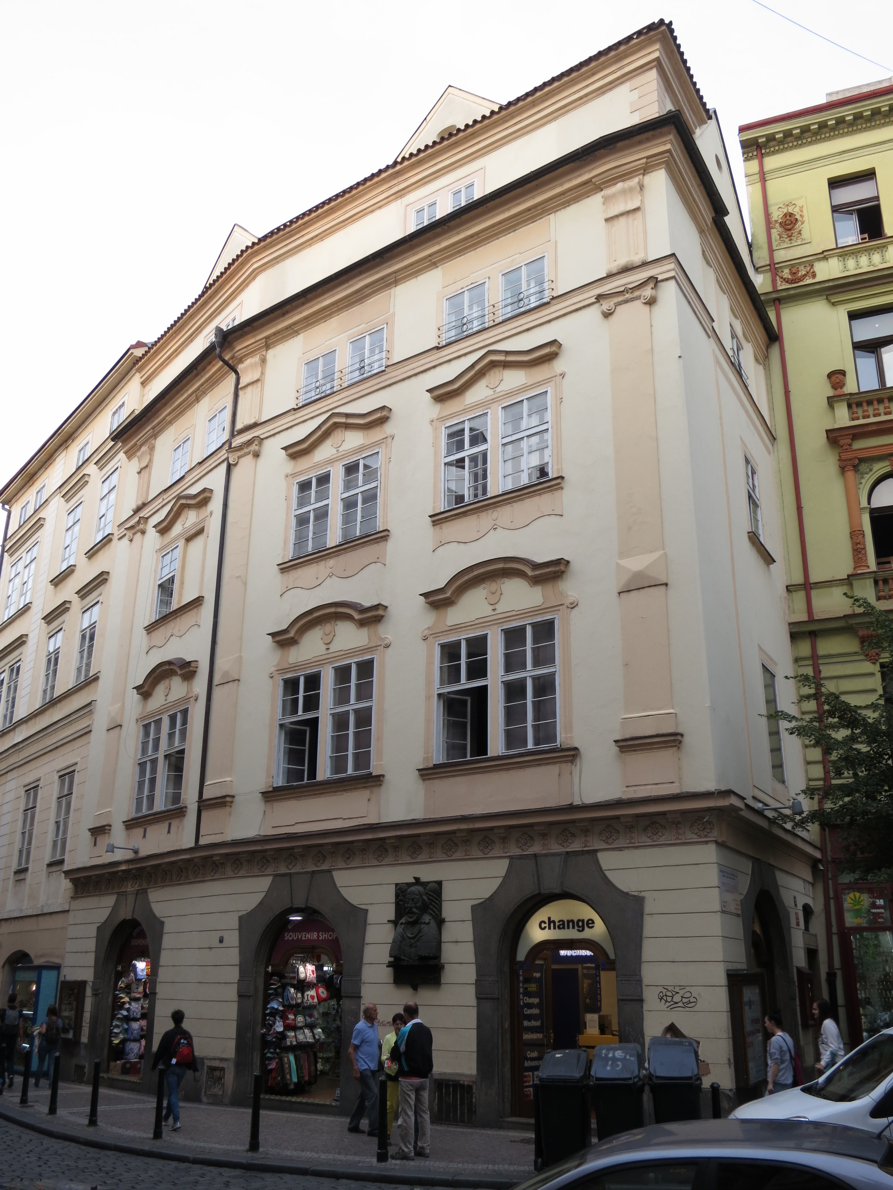 U zelené lípy, U zlaté svině, Melantrichova 472/12, Staré Město (Praha).